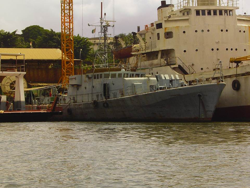 Le valeureuxjpg